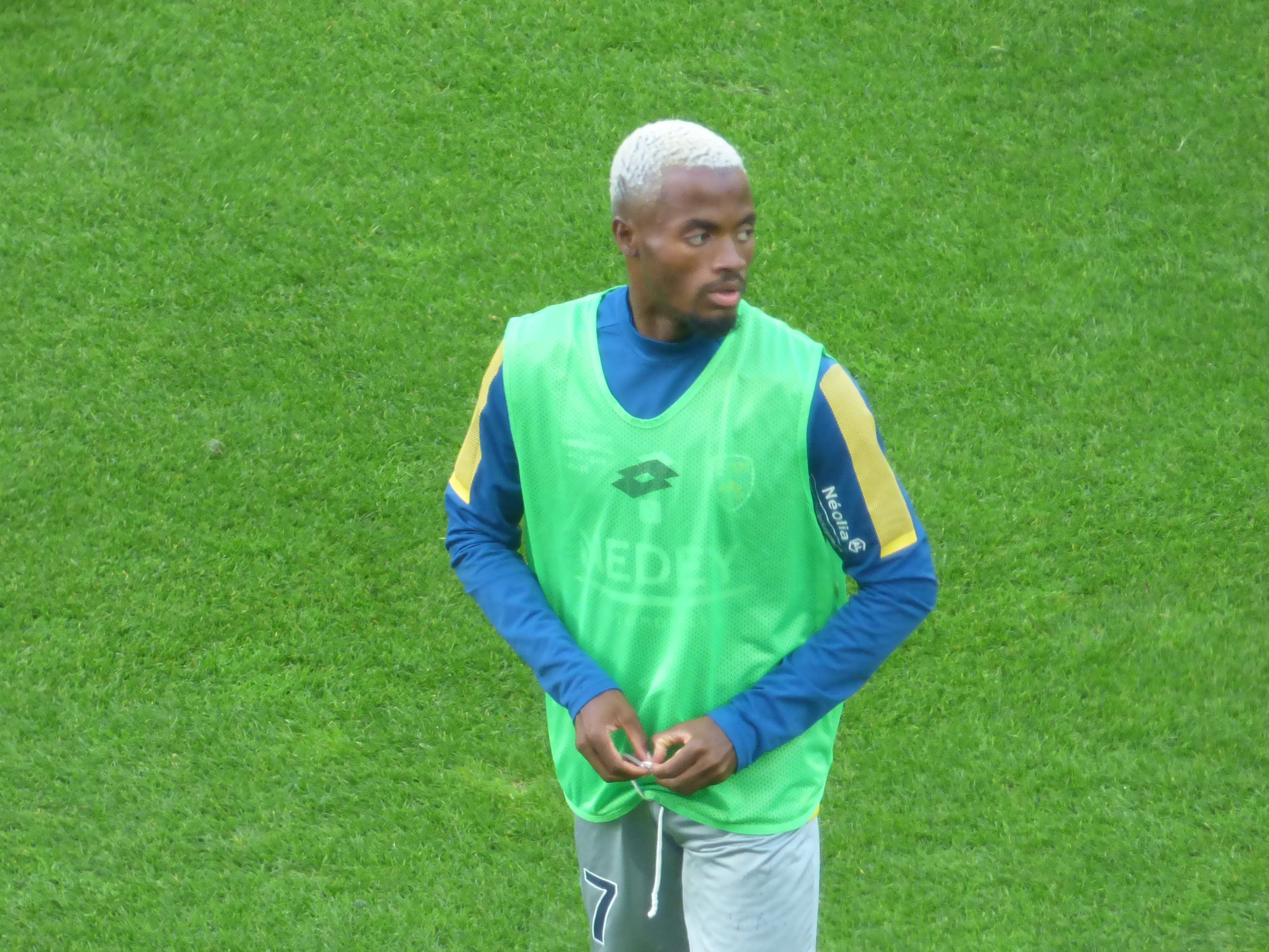 Madger Gomes avant le match Lens / Sochaux, comptant pour la septième journée du championnat de France de football de Ligue 2, le 15 septembre 2018.